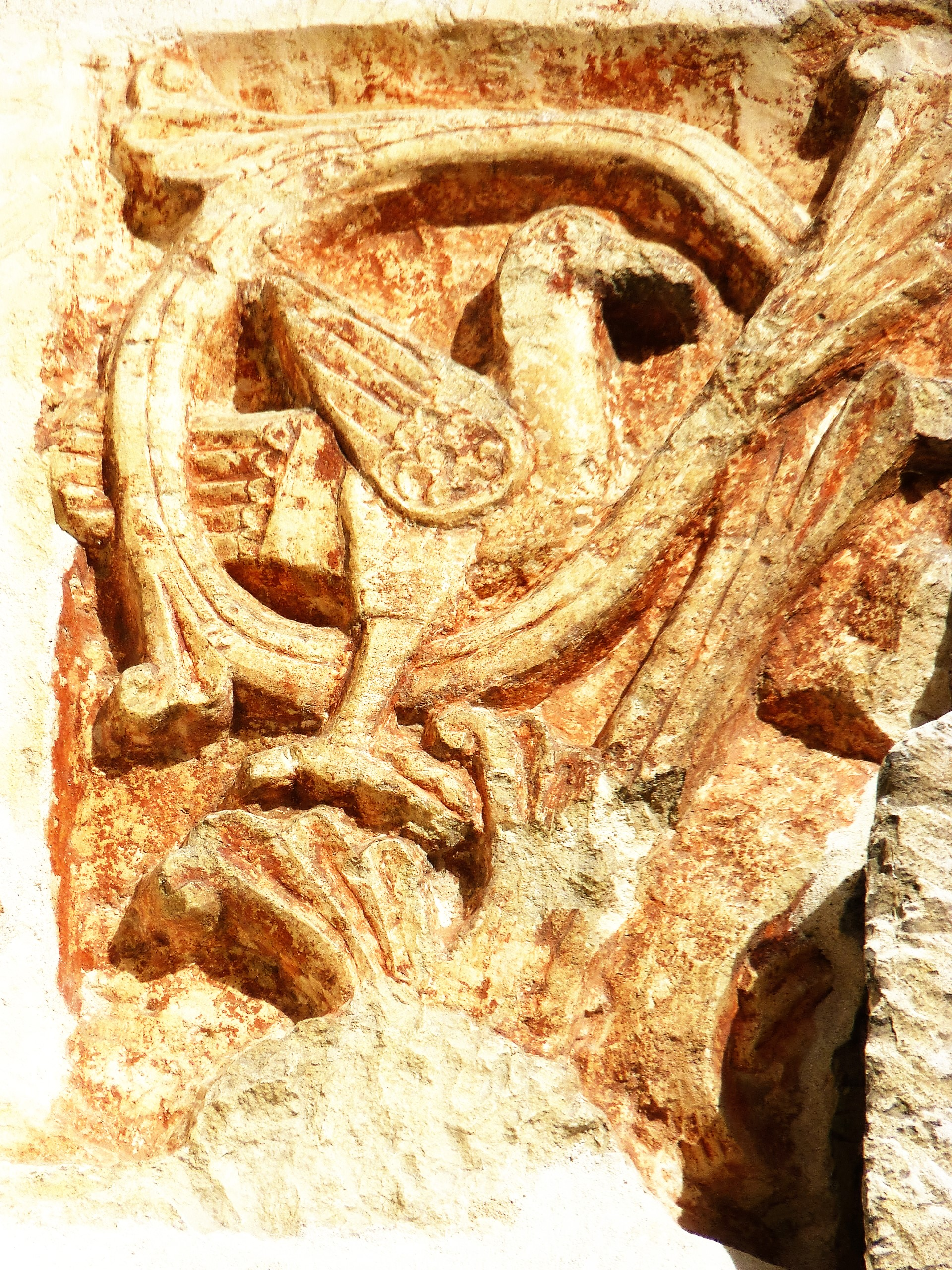 Haute-Normandie